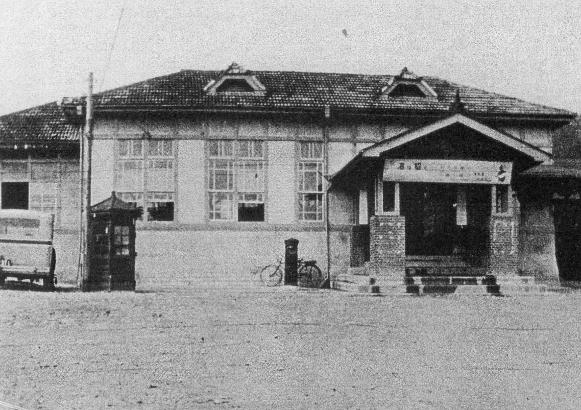 名鉄東岡崎駅舎（昭和15年頃）